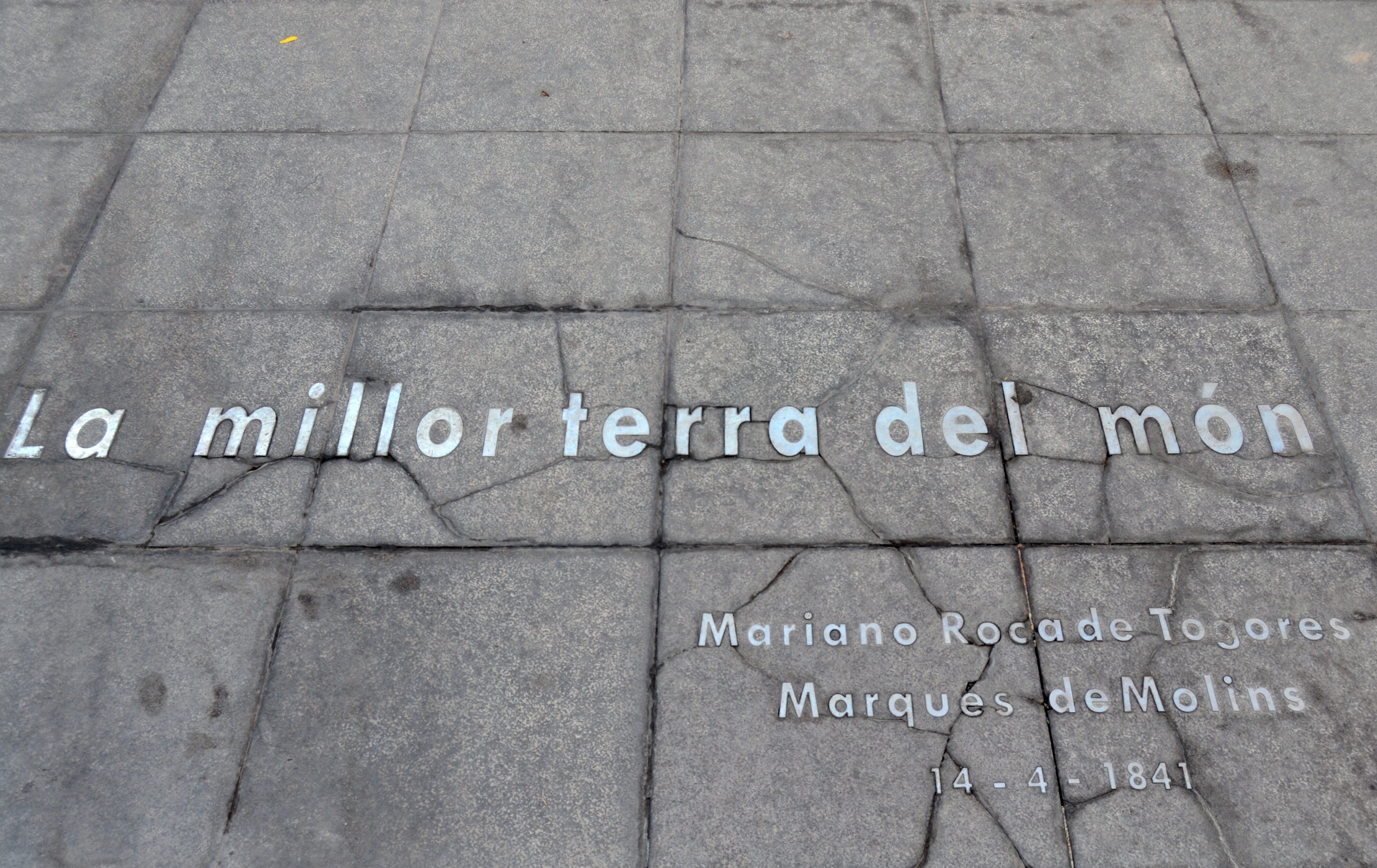 La millor terra del món, plaça de la Muntanyeta, Alacant.